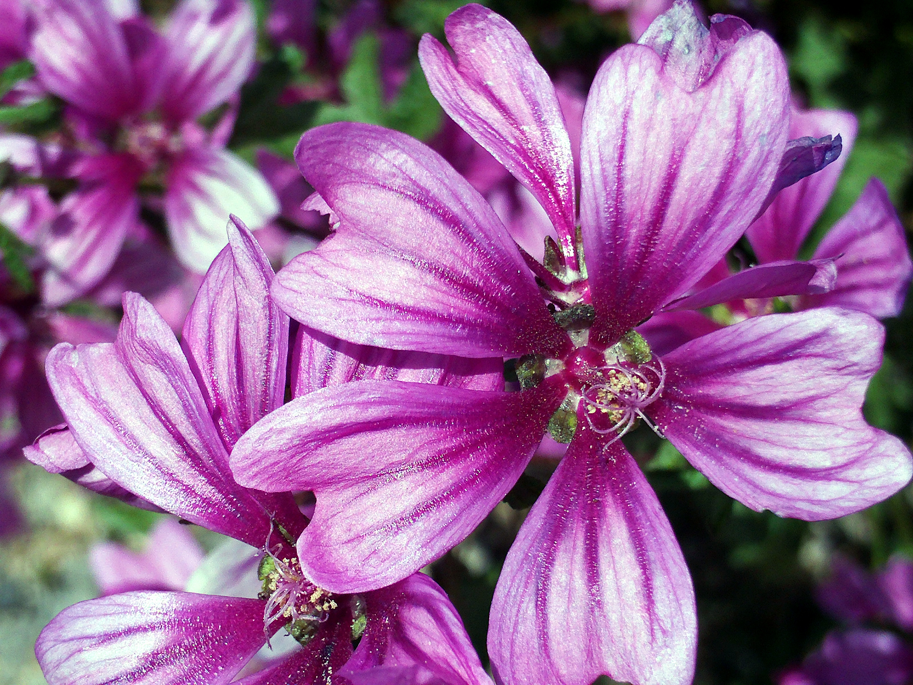 Malva sylvestris Closeup Campo de Calatrava, Miguelturra, Spain